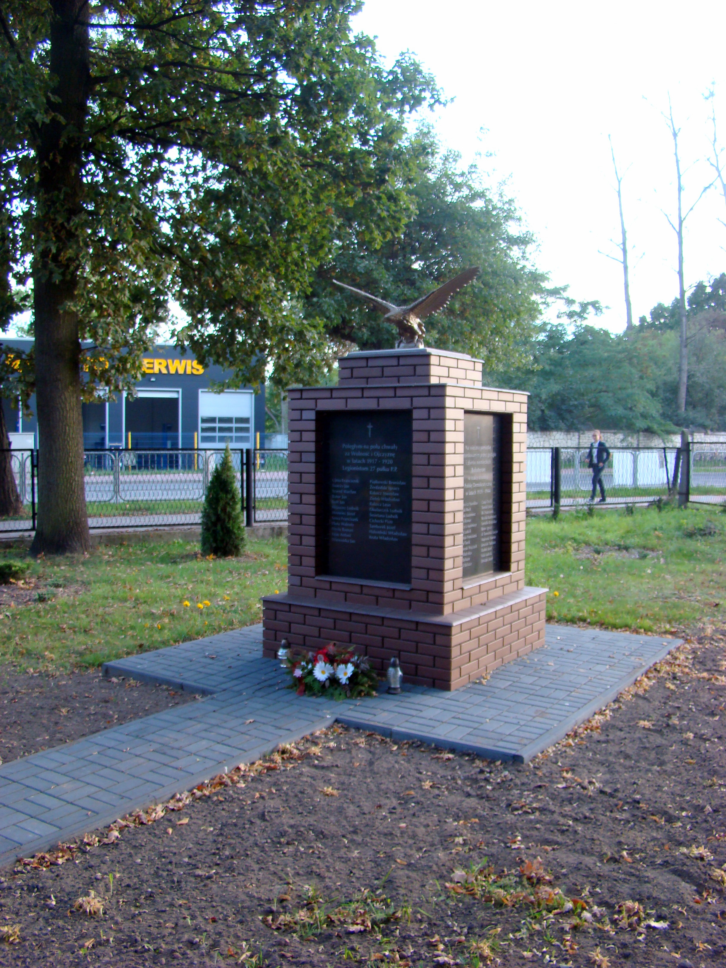 Pomnik ku czci mieszkańców Dźbowa, żołnierzy 27. Pułku Piechoty Legionów Polskich poległych w latach 1917–1920 oraz cywilów i partyzantów poległych w latach 1939–1944. Pomnik powstał w 1938 roku, lecz został zburzony przez Niemców podczas II wojny światowej. Ocalała jedynie rzeźba orła, która przeleżała w stodole. W 1946 r. pomnik został odbudowany, lecz później usunięto tablicę upamiętniającą legionistów. Odrestaurowany i ustawiony w nowym miejscu na placu szkolnym pomnik odsłonięto 8 listopada 2013 r. Pomnik tworzy ok. 2,5 m postument z trzema płytami zawierającymi nazwiska 23 legionistów i 43 ofiar II wojny światowej, rozstrzelanych w ulicznych egzekucjach, w trakcie aresztowania oraz zamordowanych w obozach koncentracyjnych. Wieńczy go orzeł pochodzący z 1938 roku.